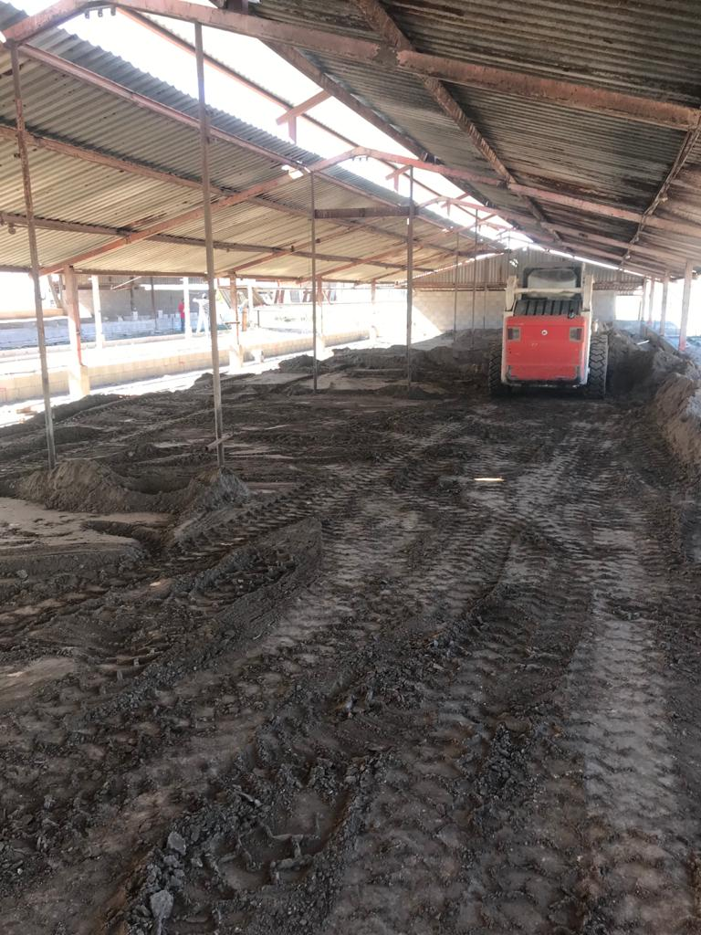 Mini cargadora siendo utilizada por estudiantes de ingeniería, de espaldas.